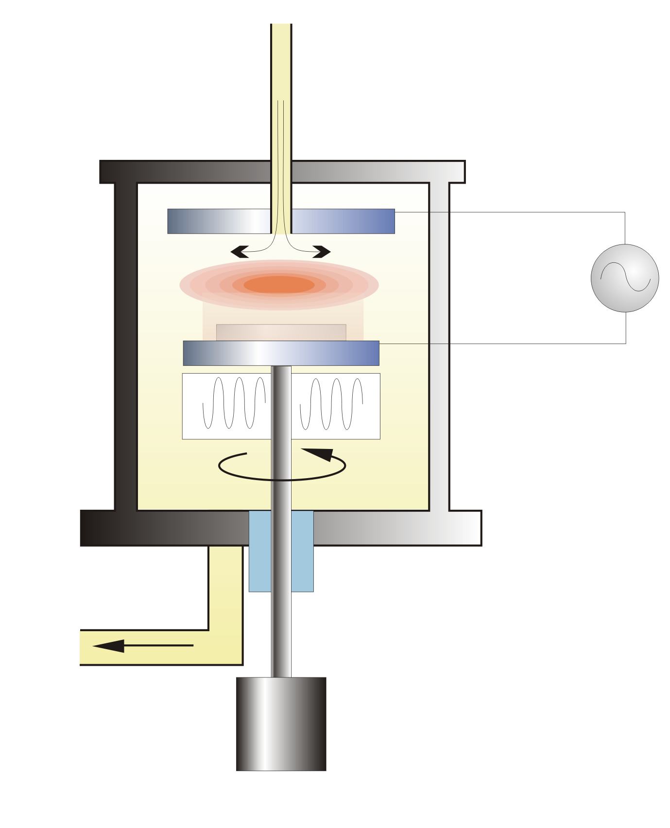 Esquema de un reactor CDV para la síntesis de nanotubos. El esquema se ha realizado con CorelDraw y se ha exportado a una resolución de 600 ppm en formato PNG.